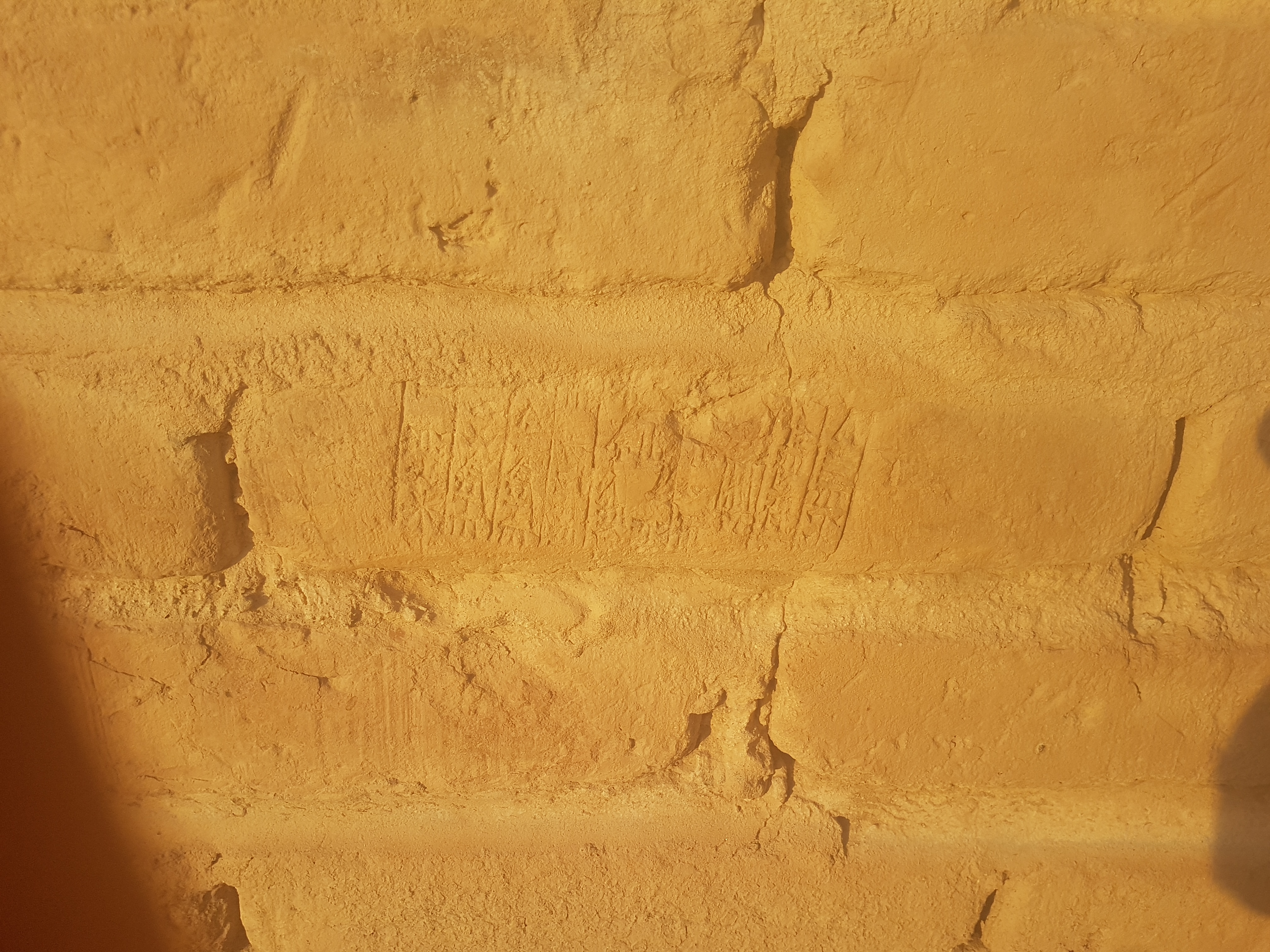 زقورة عقرقوف وهي زقورة تَقع في محافظة بغداد، العراق، كانت إحدى المُدن في جنوب بلاد وادي الرافدين بالقرب من التقاء نهري دِجلة وديالى على بعد 30 كيلو متر (19 ميل) من غرب مركز بغداد